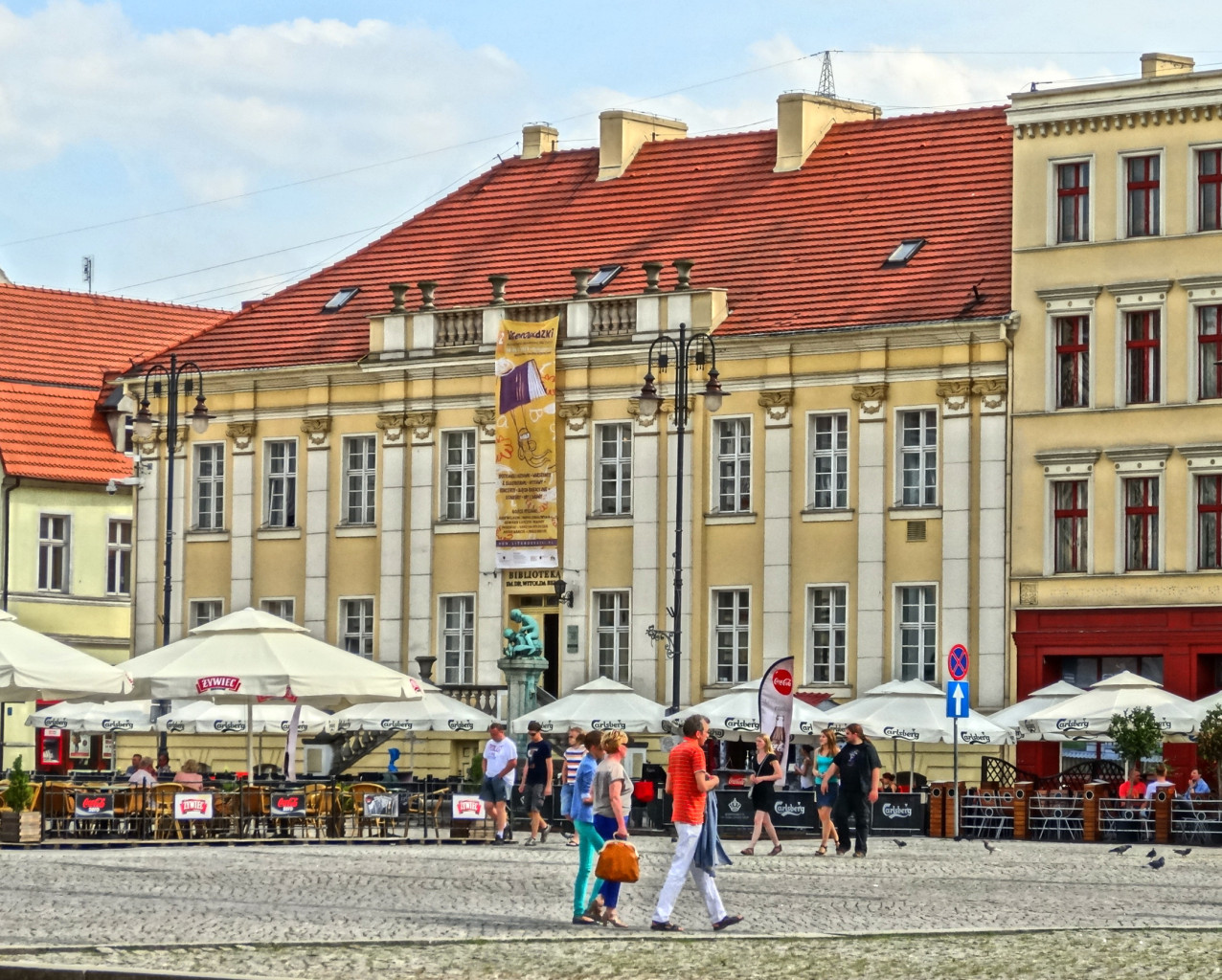 Wojewódzka i Miejska Biblioteka Publiczna w Bydgoszczy, budynek przy Starym Rynku